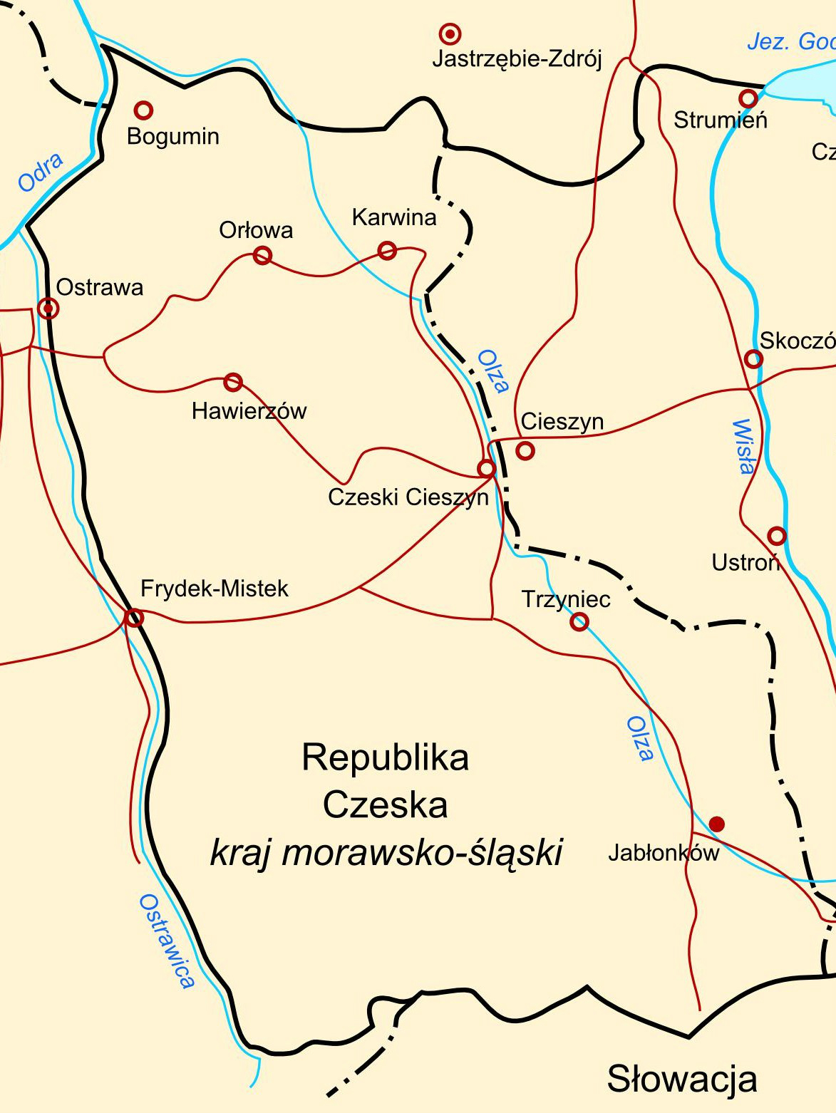 Współczesna mapa Zaolzia.